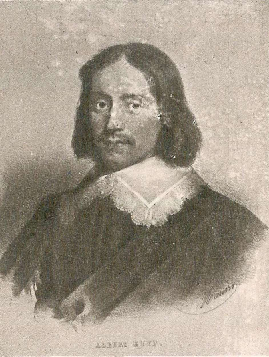 10 Albert Cuyp, Schilder, 1620-1691. Vaderlandse Historie 2 (1926)